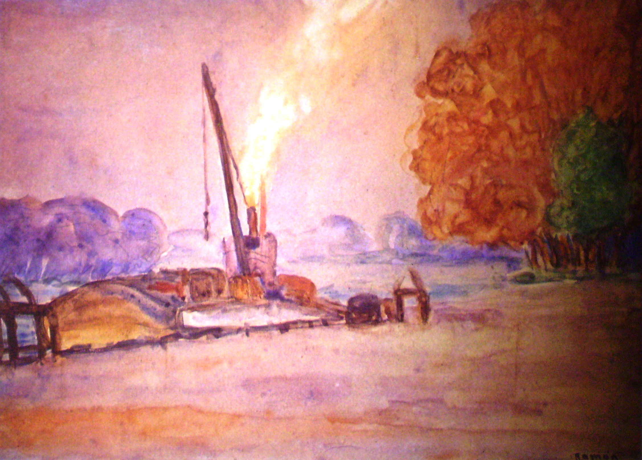 see below